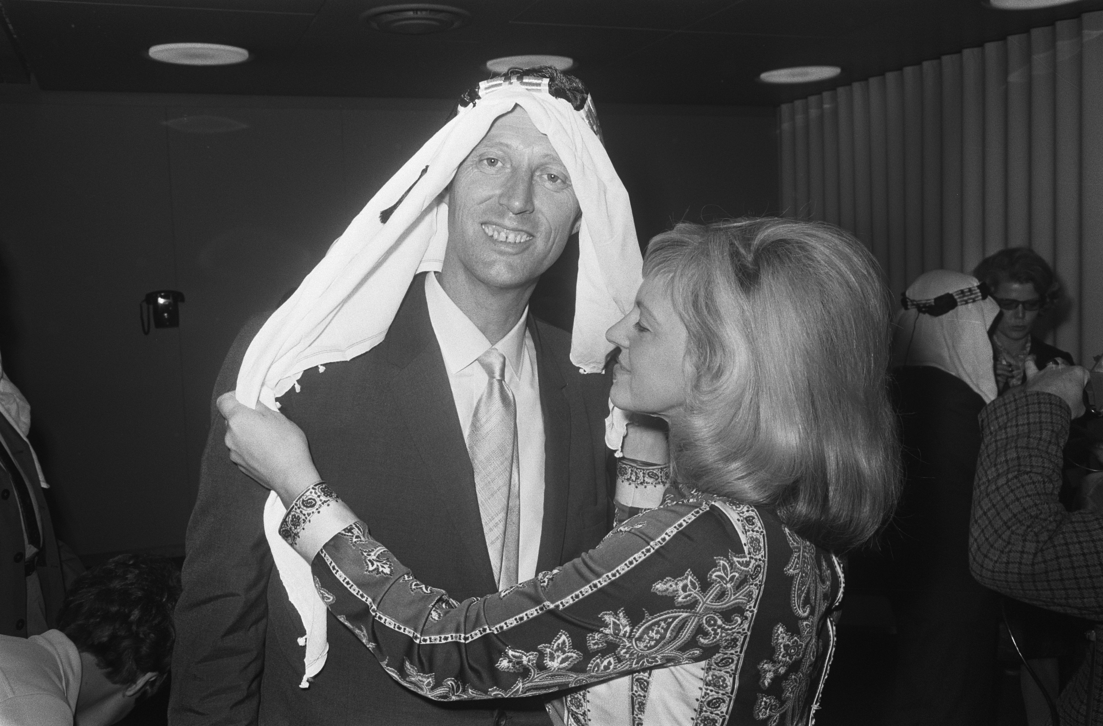 Dutch Swing College arriveert op Schiphol, Peter Schilperoort (met keffiyeh) , leider DSC, wordt begroet door zijn echtgenote.